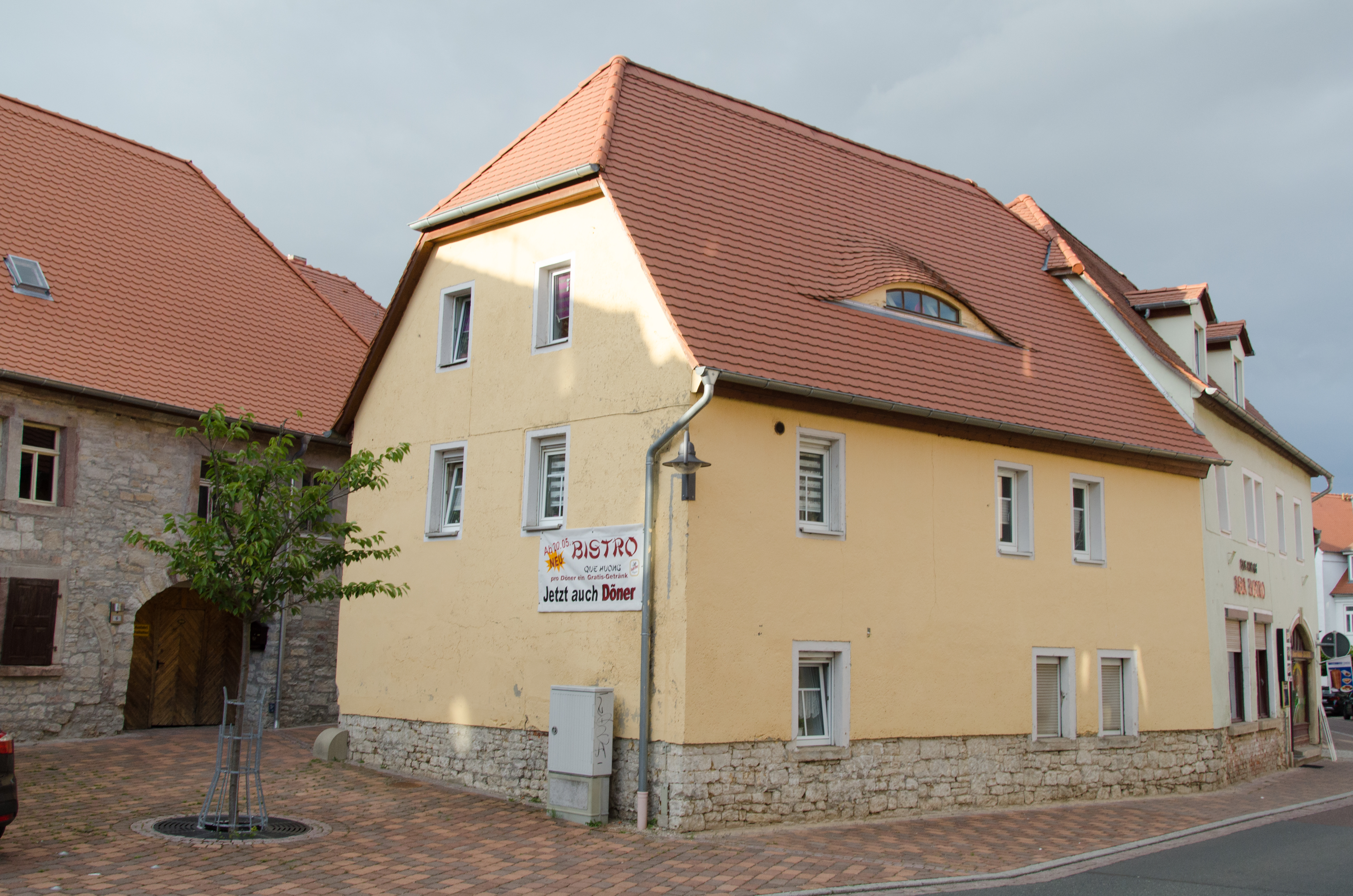 Querfurt, Lederberg 2